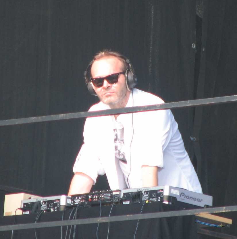 Erik Morna Vabaduse Laulul